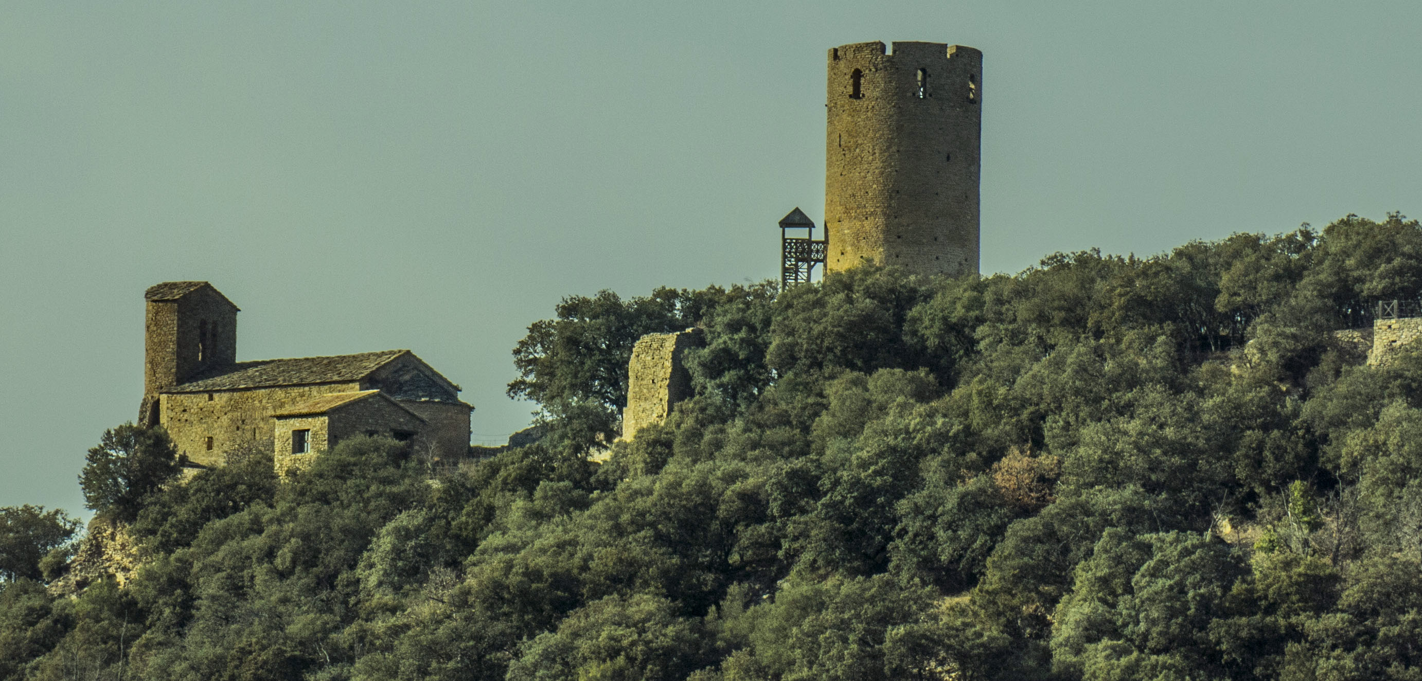 A Fontova (La Pobla de Fontova-Graus), a la comarca de la Ribagorça de l'Aragó.